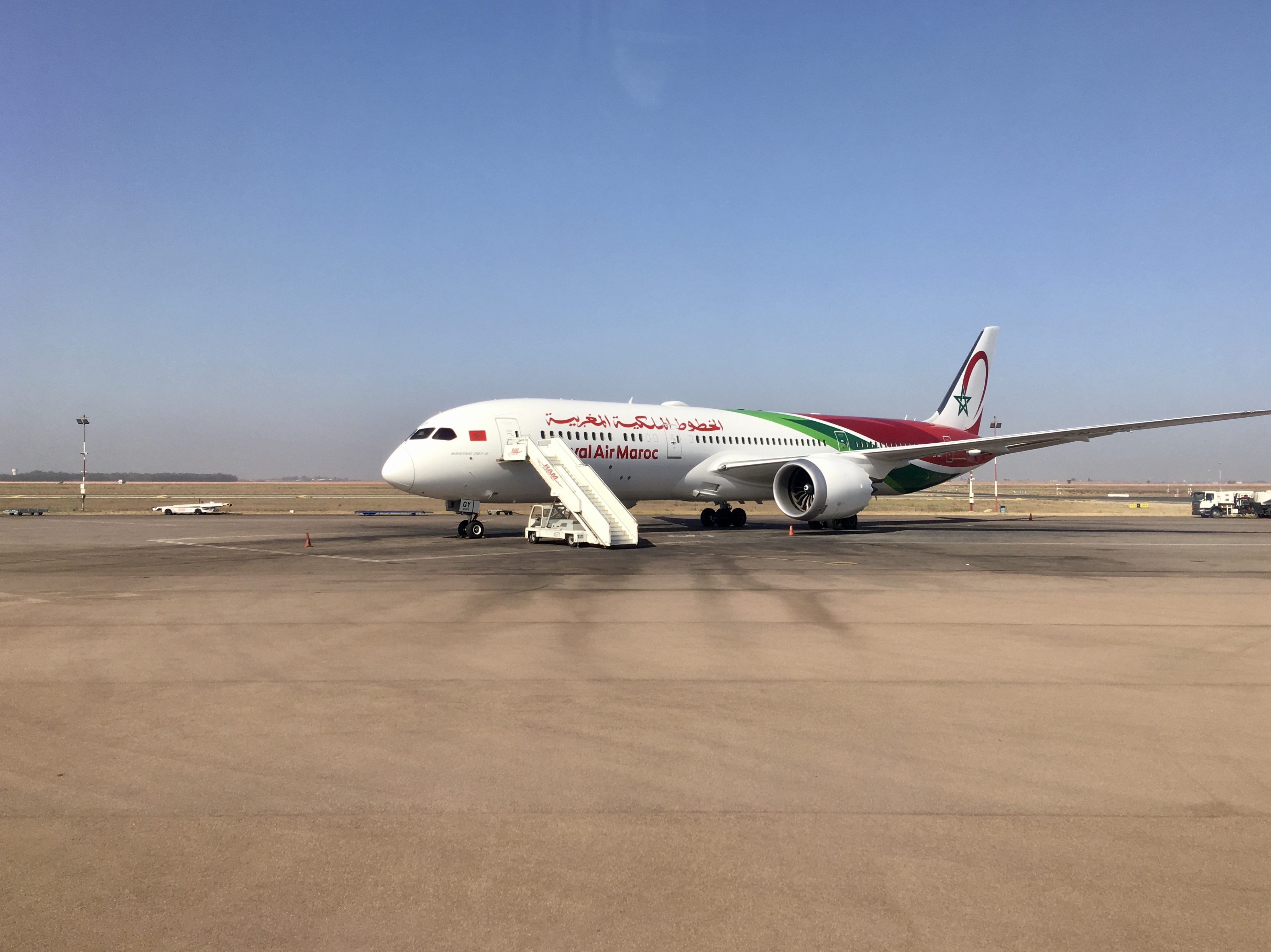 Un avion de la compagnie Royal Air Maroc à l'aéroport international Mohammed V de Casablanca